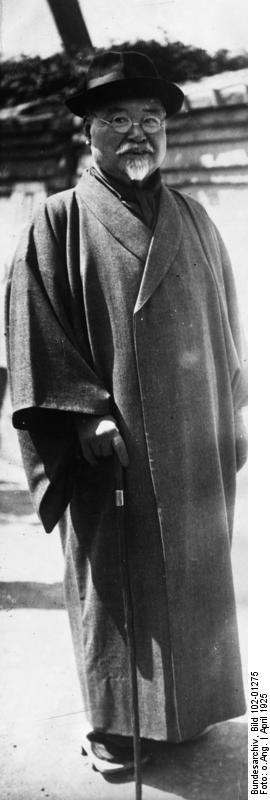 Tokio. Neueste Aufnahme des japanischen Premierministers Korekiyo Takahashi, welcher augenblicklich die japanische Politik in hervorragender Weise führt.